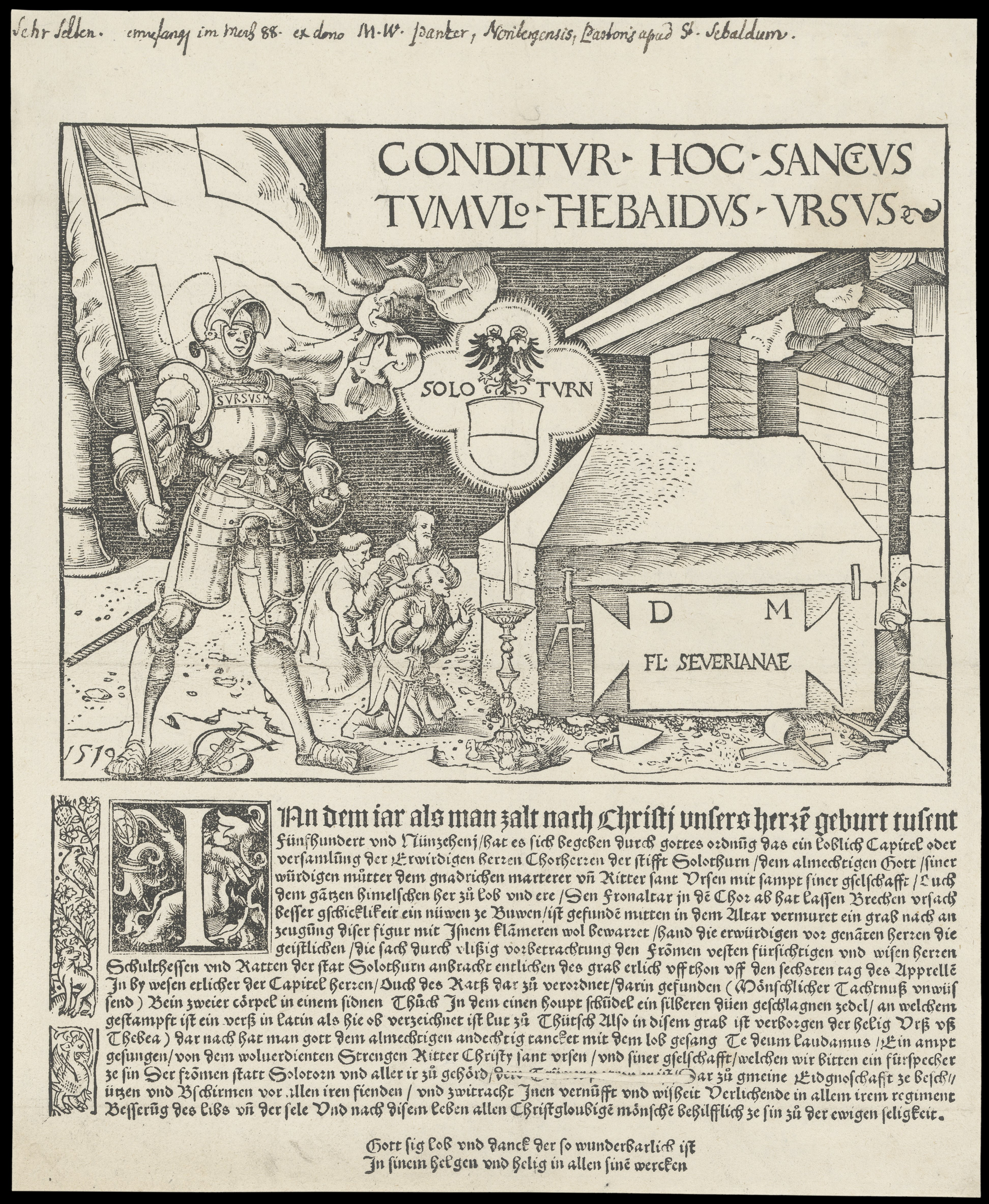 Conditur hoc sanctus Tumulo Thebaidus Ursus